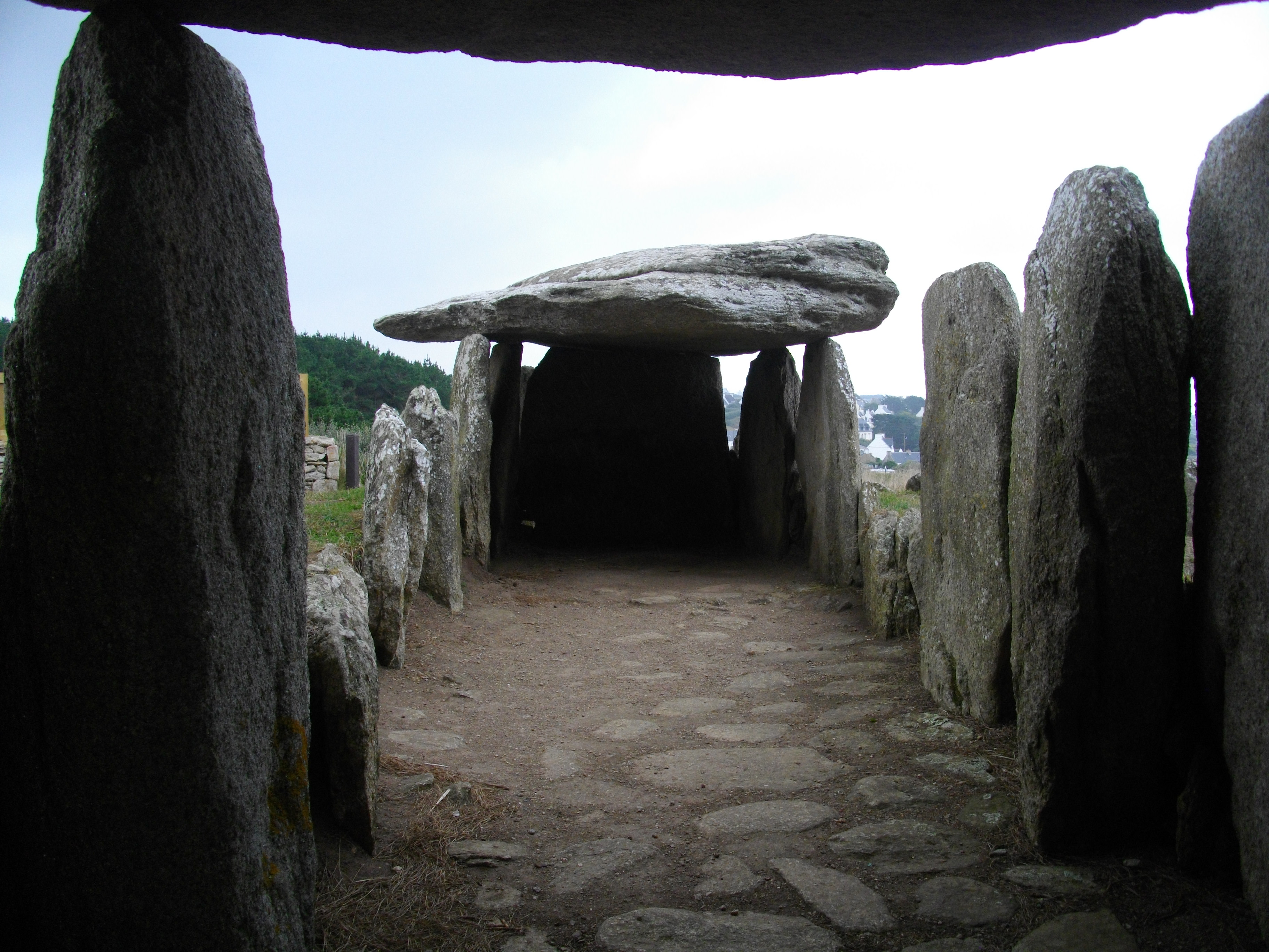 Allée couverte Menez Korriged de Pors Poulhan à Plouhinec, chez Plozévet